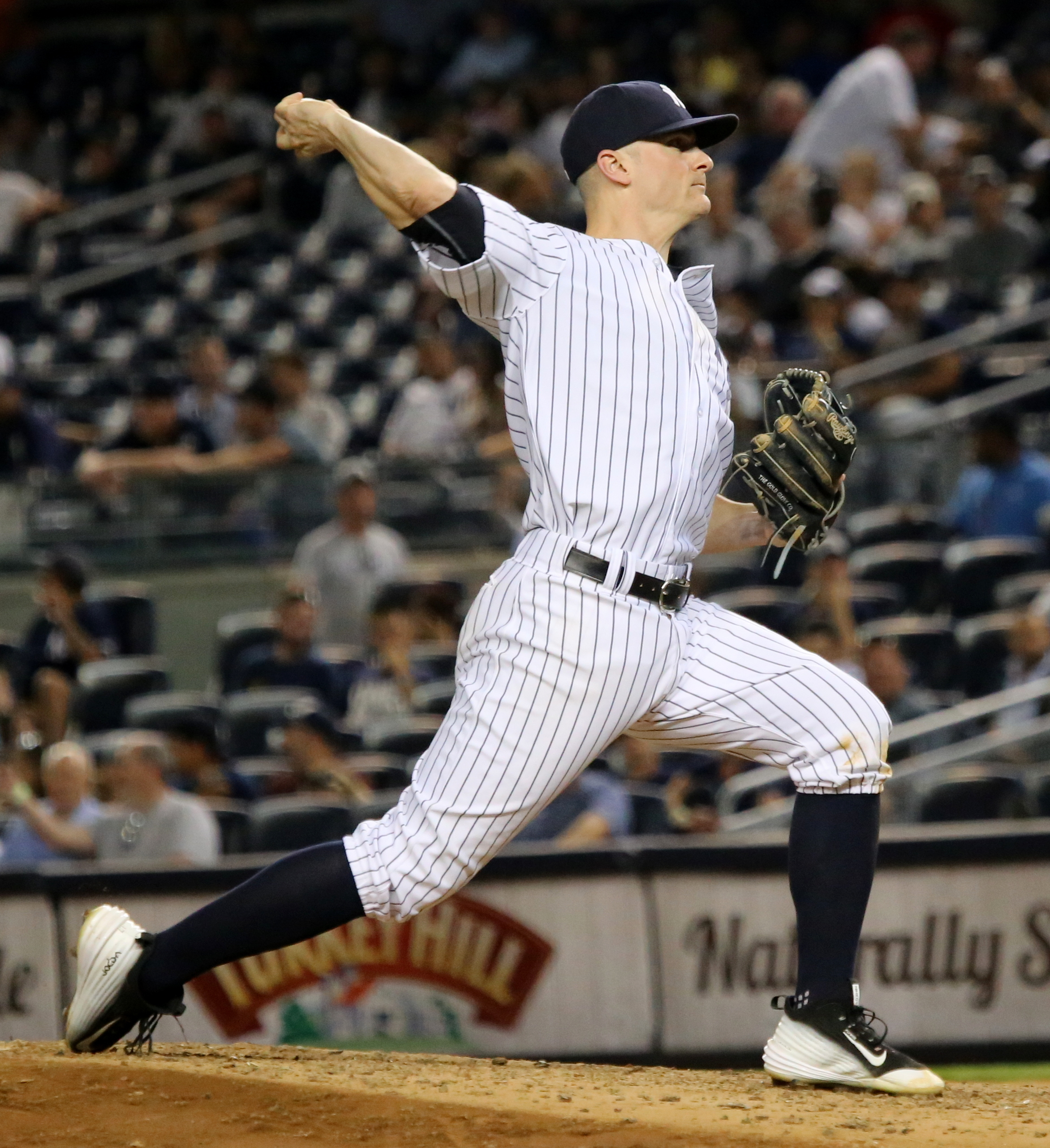 Brendan Ryan